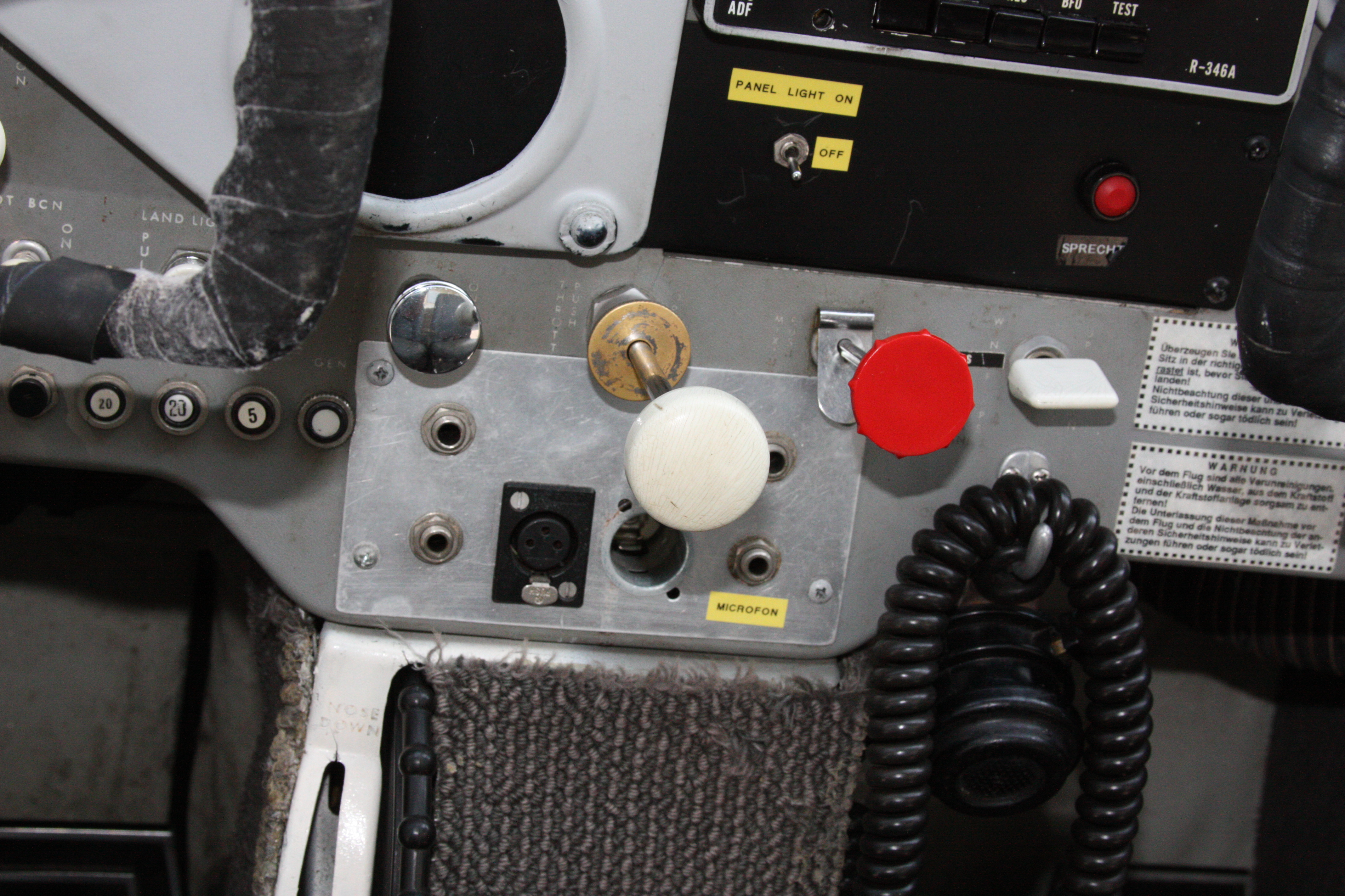 Cessna C172, Cockpit